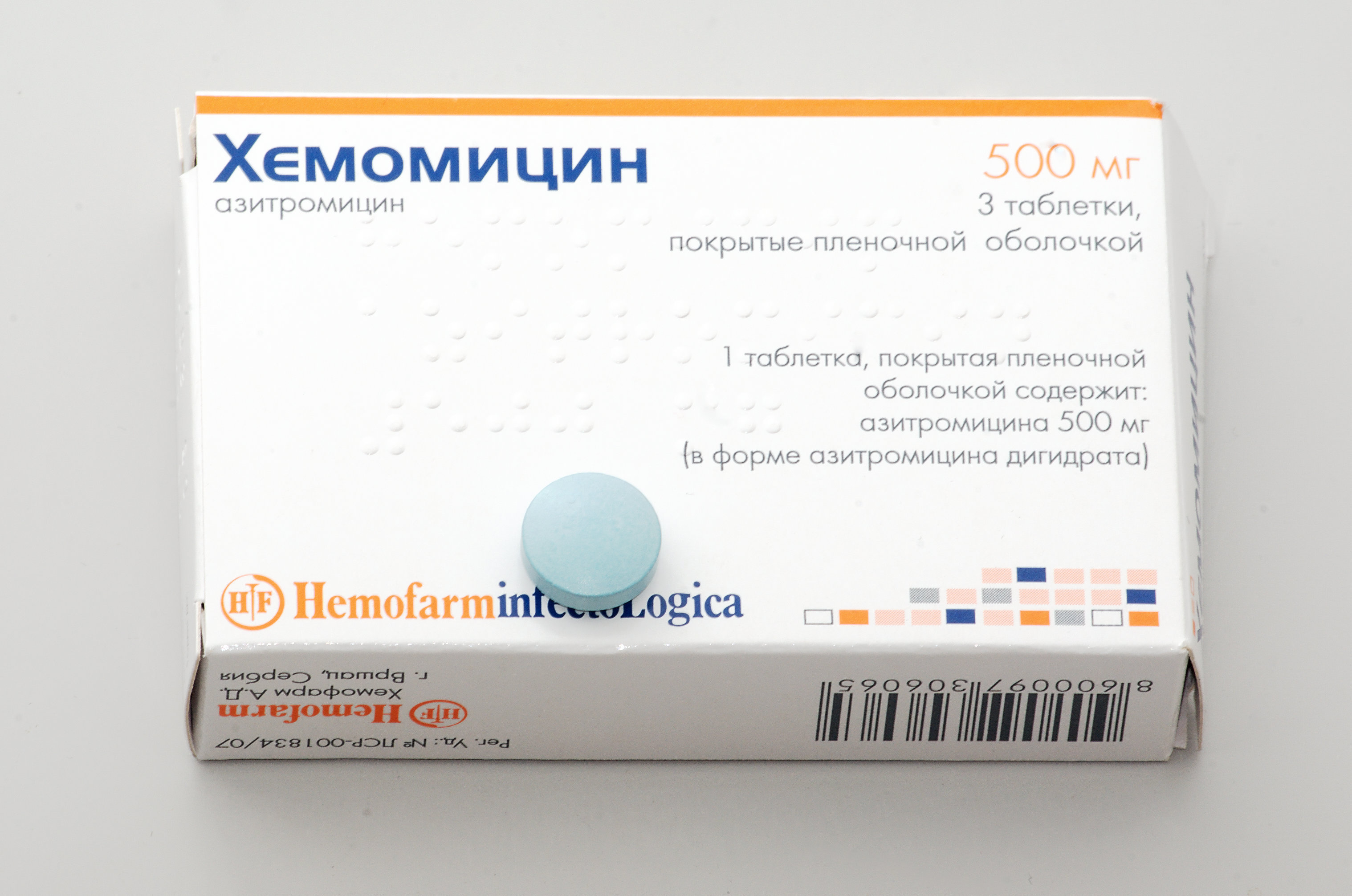 Хемомицин